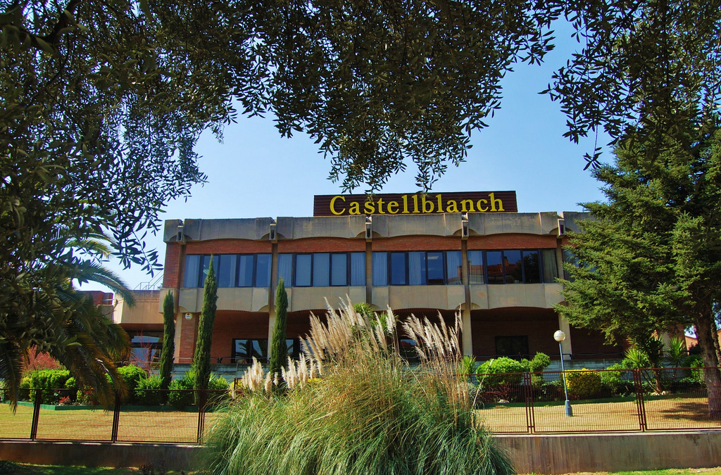 Caves Castellblanch (Sant Sadurní d'Anoia)